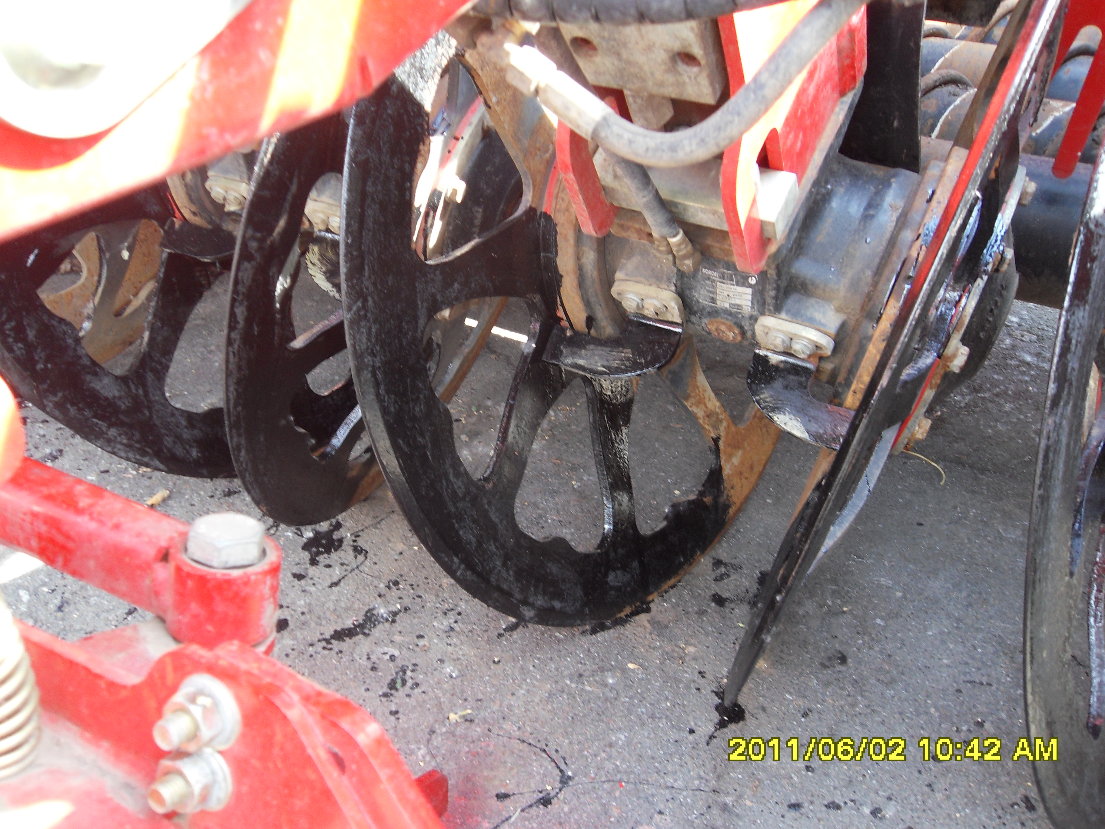 Дисковий копач бурякозбирального комбайна